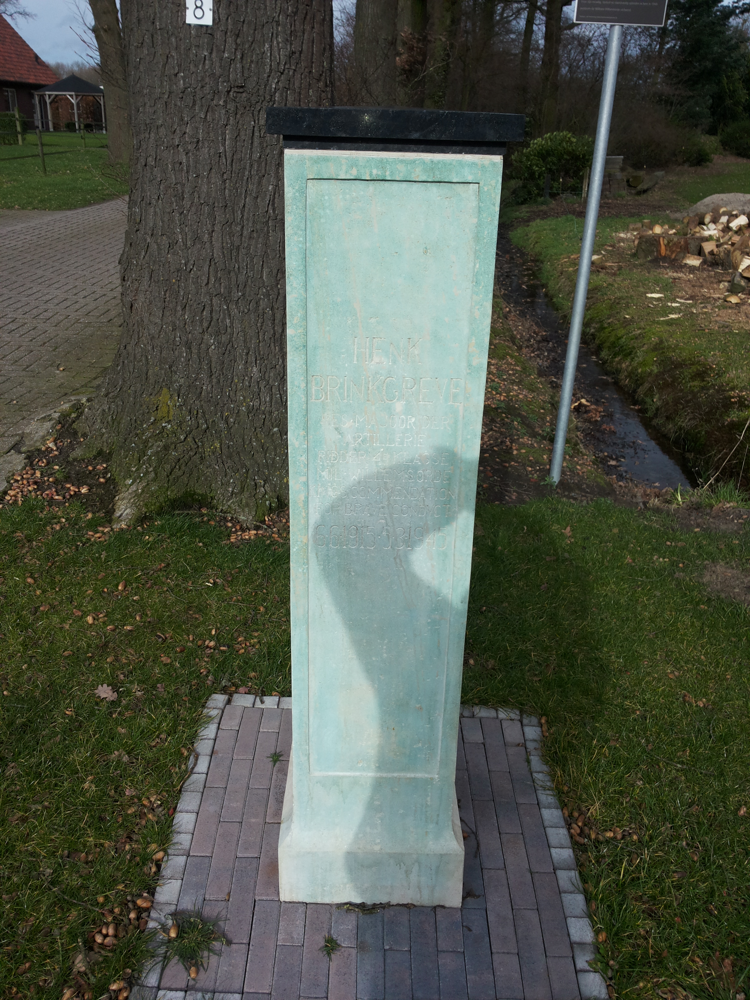 Het gedenkteken in Enschede bestond uit een natuurstenen sokkel met daarop een bronzen beeld. In 2010 is het beeld gestolen. De familie laat nu een nieuw gedenkteken maken en zocht een herbestemming voor de sokkel. Men dacht daarbij aan de boerderij, waar Henk Brinkgreve is doodgeschoten. De Historische Kring Losser heeft dit idee ‘omarmd’ en de familie Theo Damhuis, de huidige eigenaar/bewoner van de boerderij, werd bereid gevonden om mee te werken aan het plaatsen van de sokkel (hierna: het monument) bij het begin van de oprit naar de boerderij, dus dicht bij de openbare weg. Op het monument staat de naam van Henk Brinkgreve en de tekst ‘Hij hield de fakkel brandende’. Ook zijn de onderdelen vermeld waarbij hij heeft gediend en de onderscheidingen die hem zijn verleend.